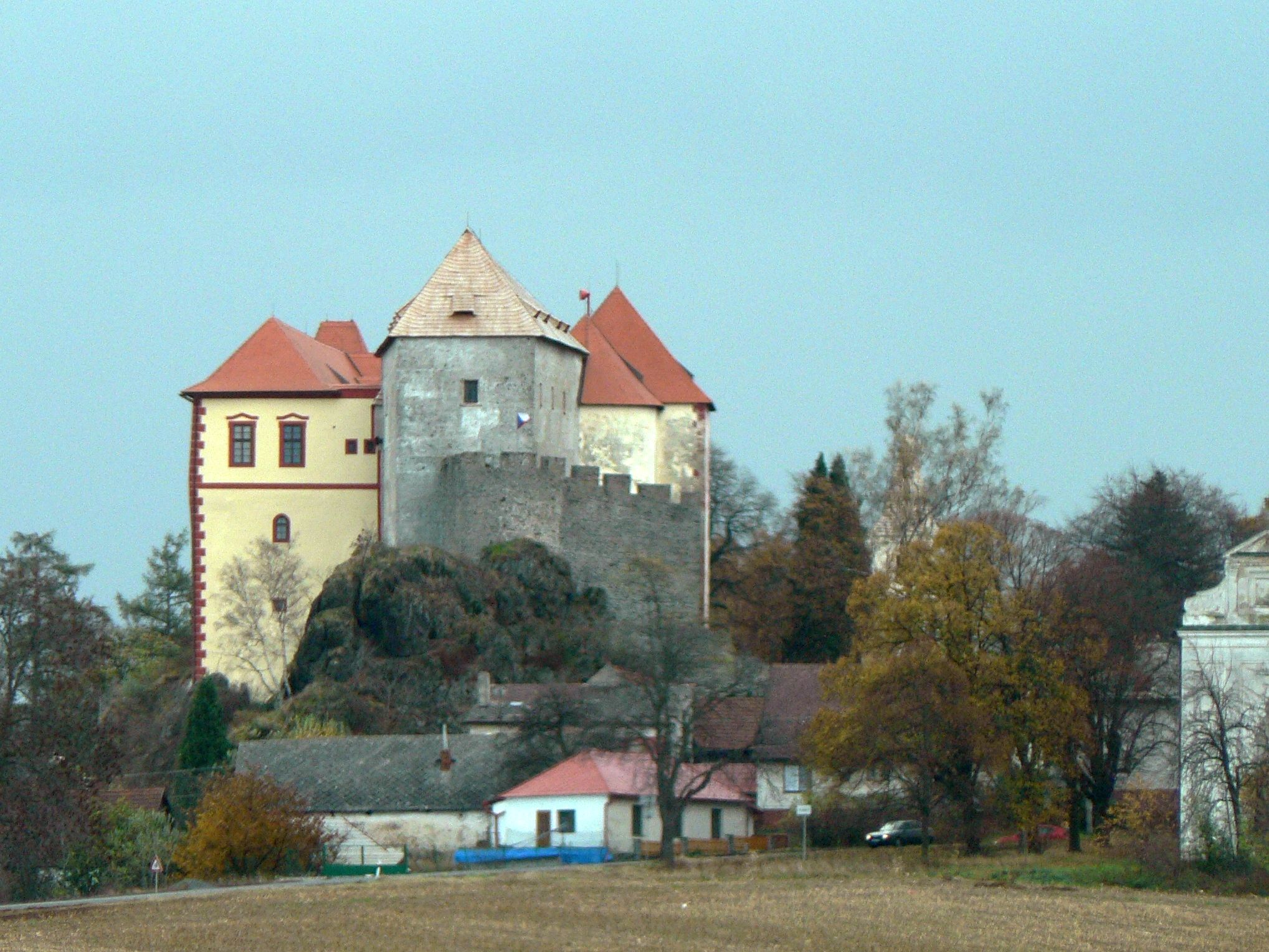 Hrad Kámen